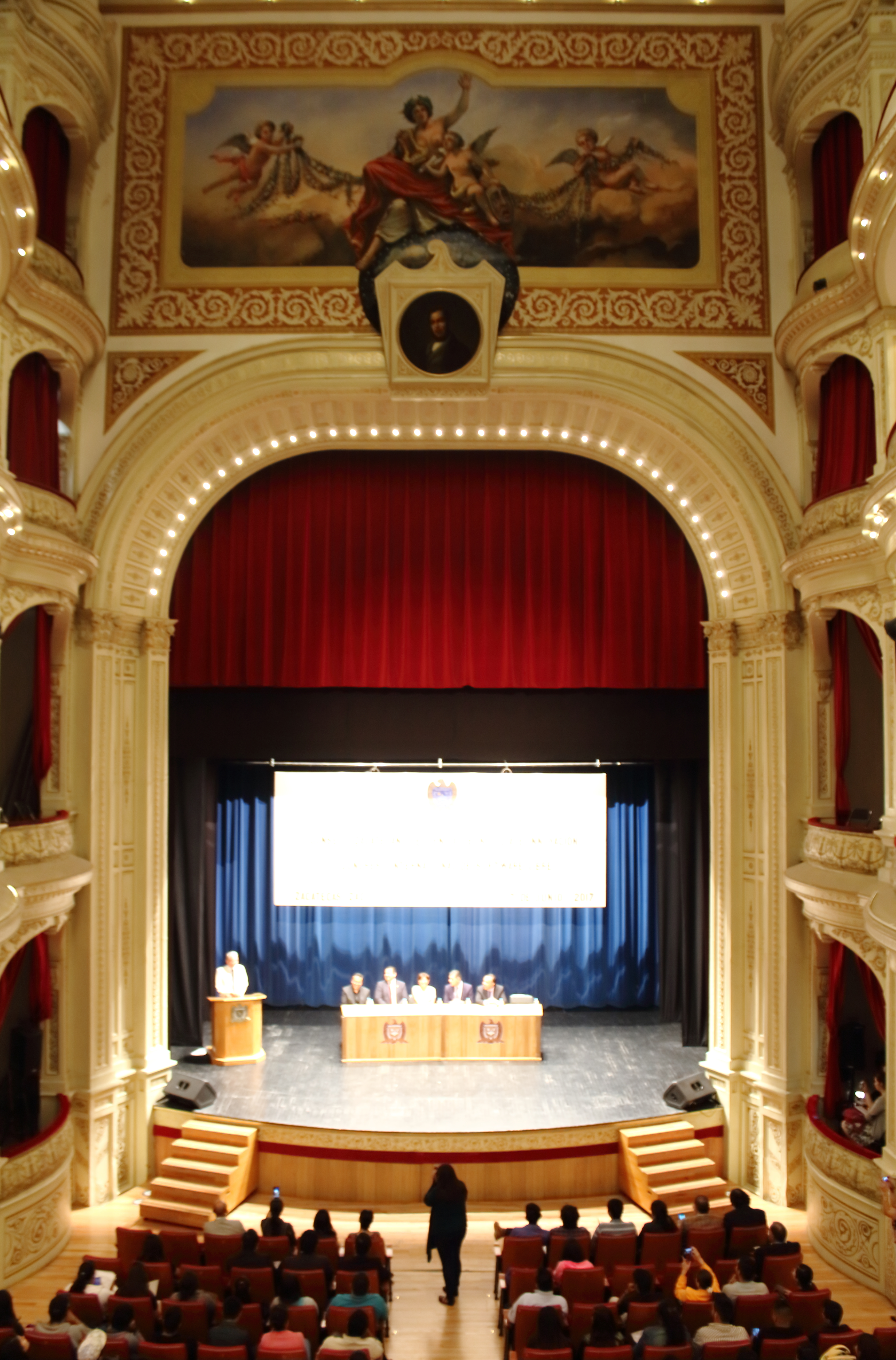 Inauguración del CISOL 2017 en Zacatecas.